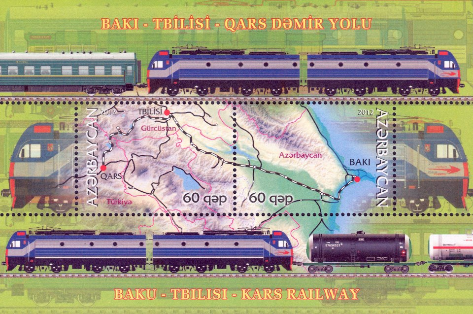 Bakı - Tbilisi - Qars dəmir yolu